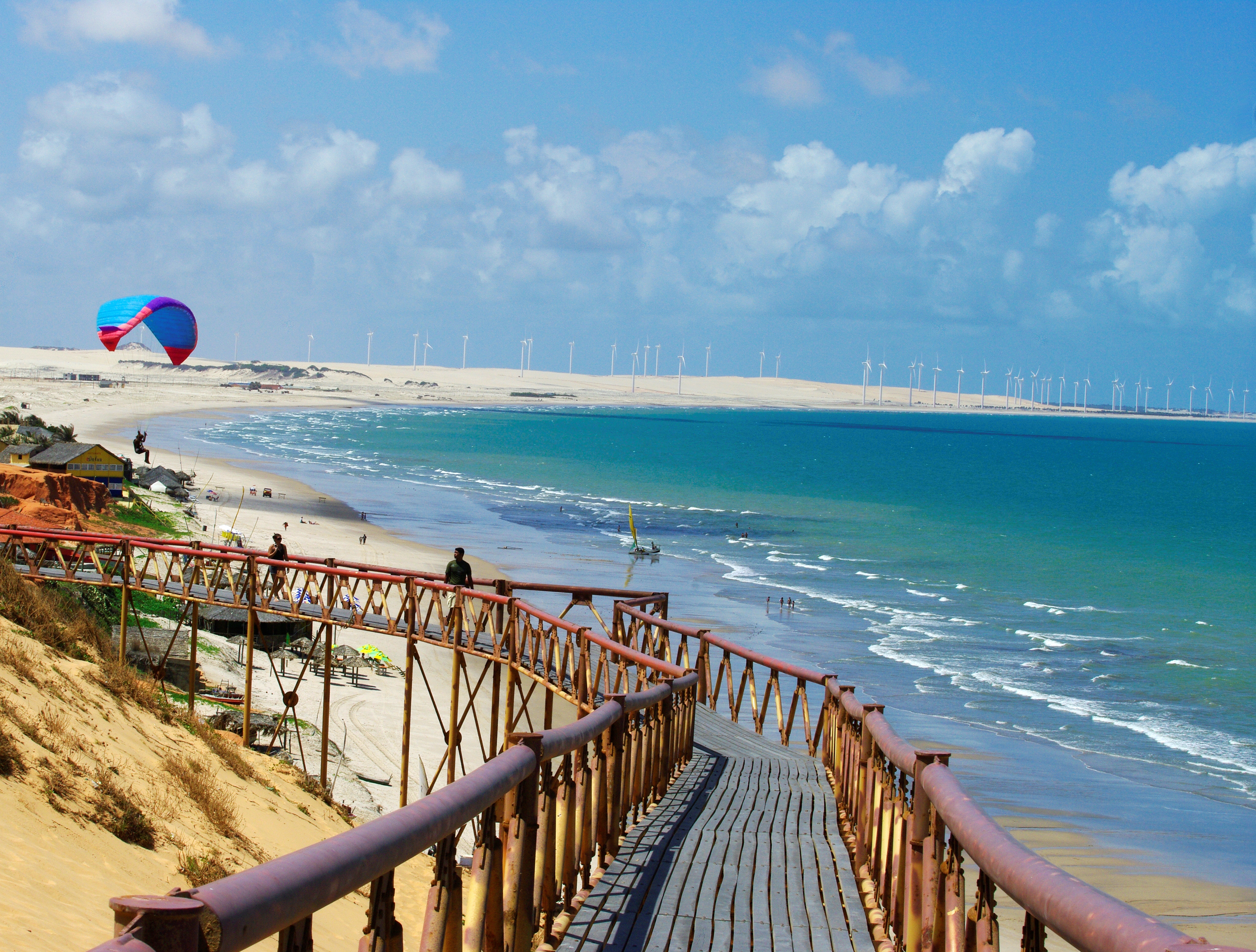 Geradores eólicos - Canoa Quebrada-CE, Brasil.